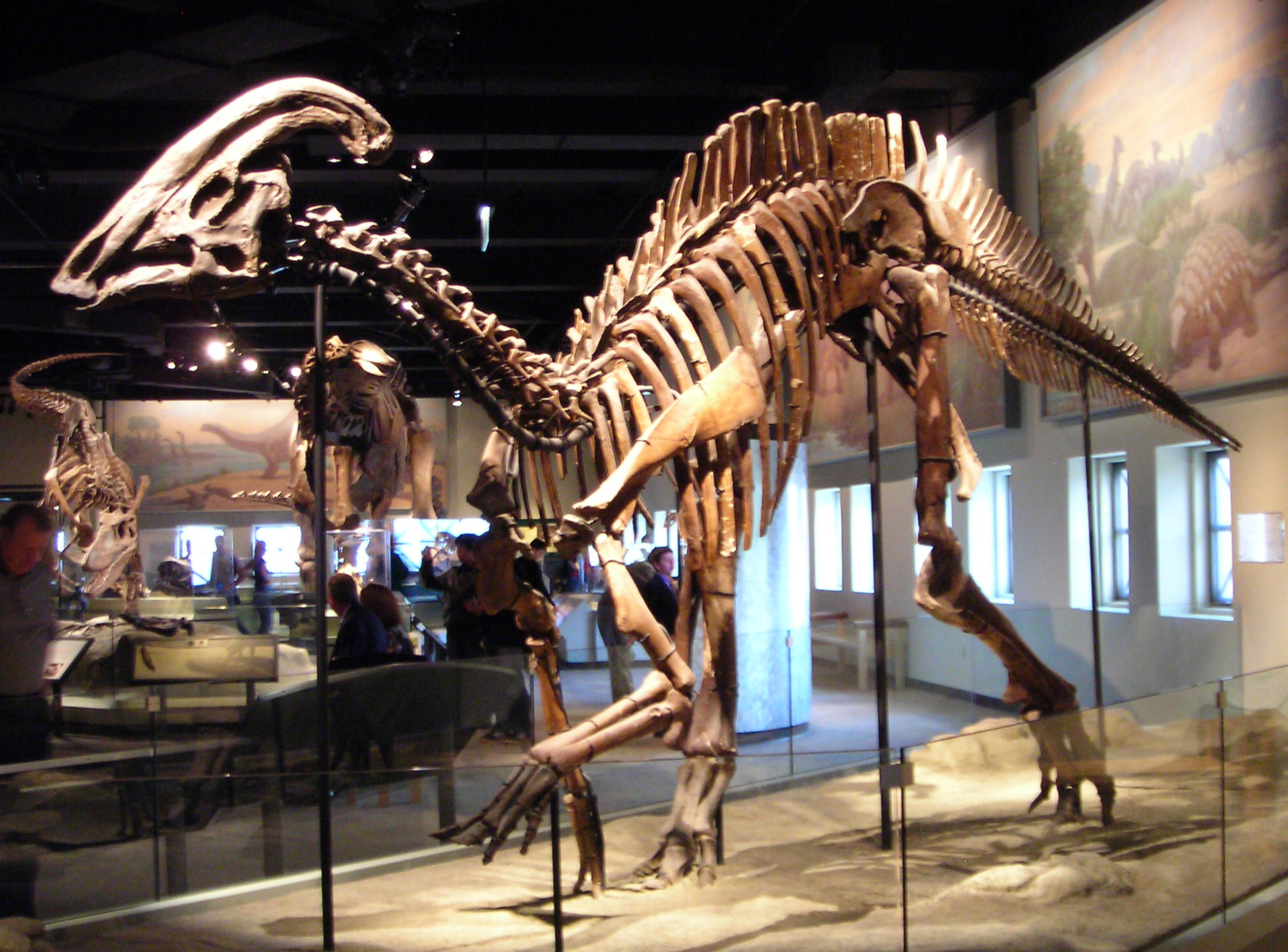 Parasaurolophus cyrtocristatus skeleton, Field Museum.